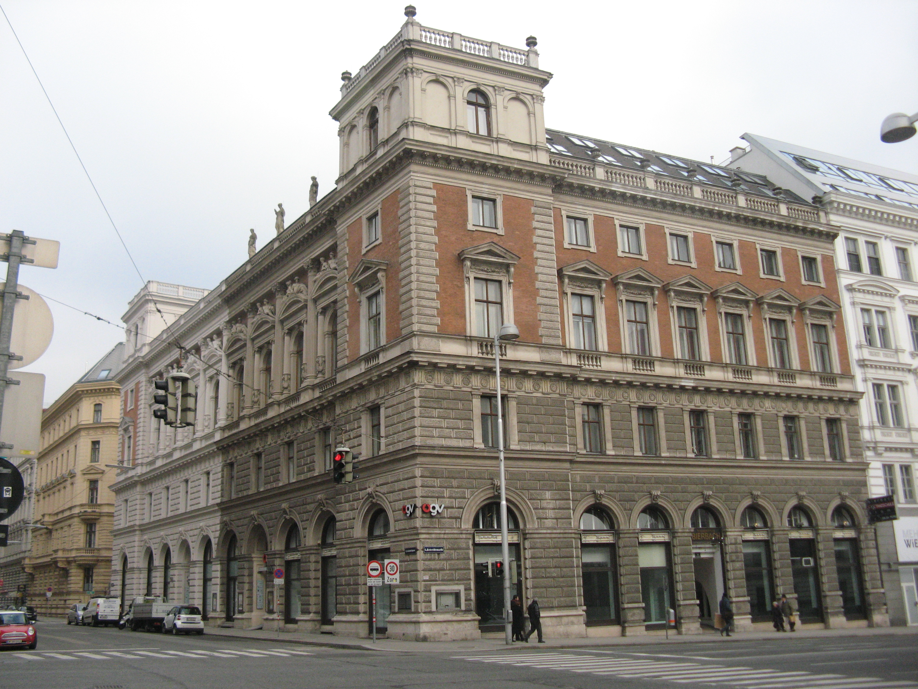 Palais Eschenbach (1870-1872) von Otto Thienemann, Eschenbachgasse 11, Wien-Innere Stadt